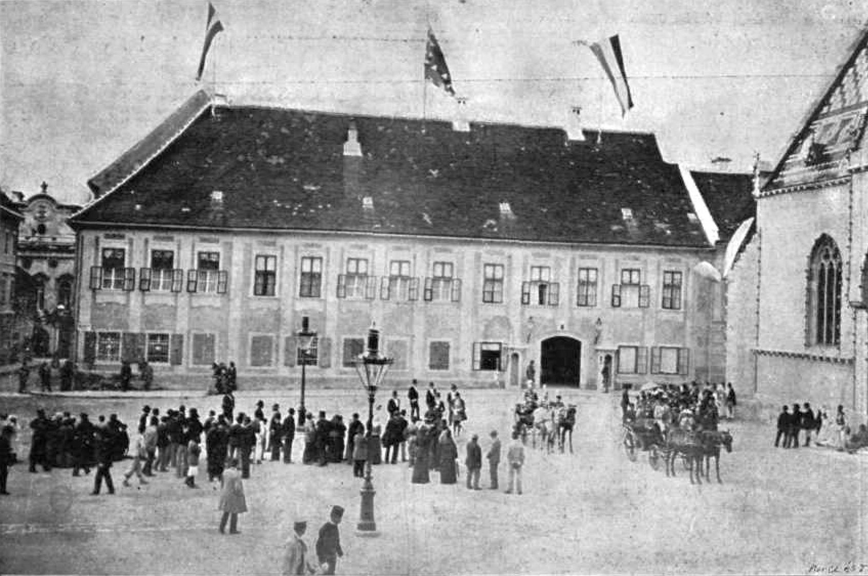 Képek Zagrábból. – A báni palota